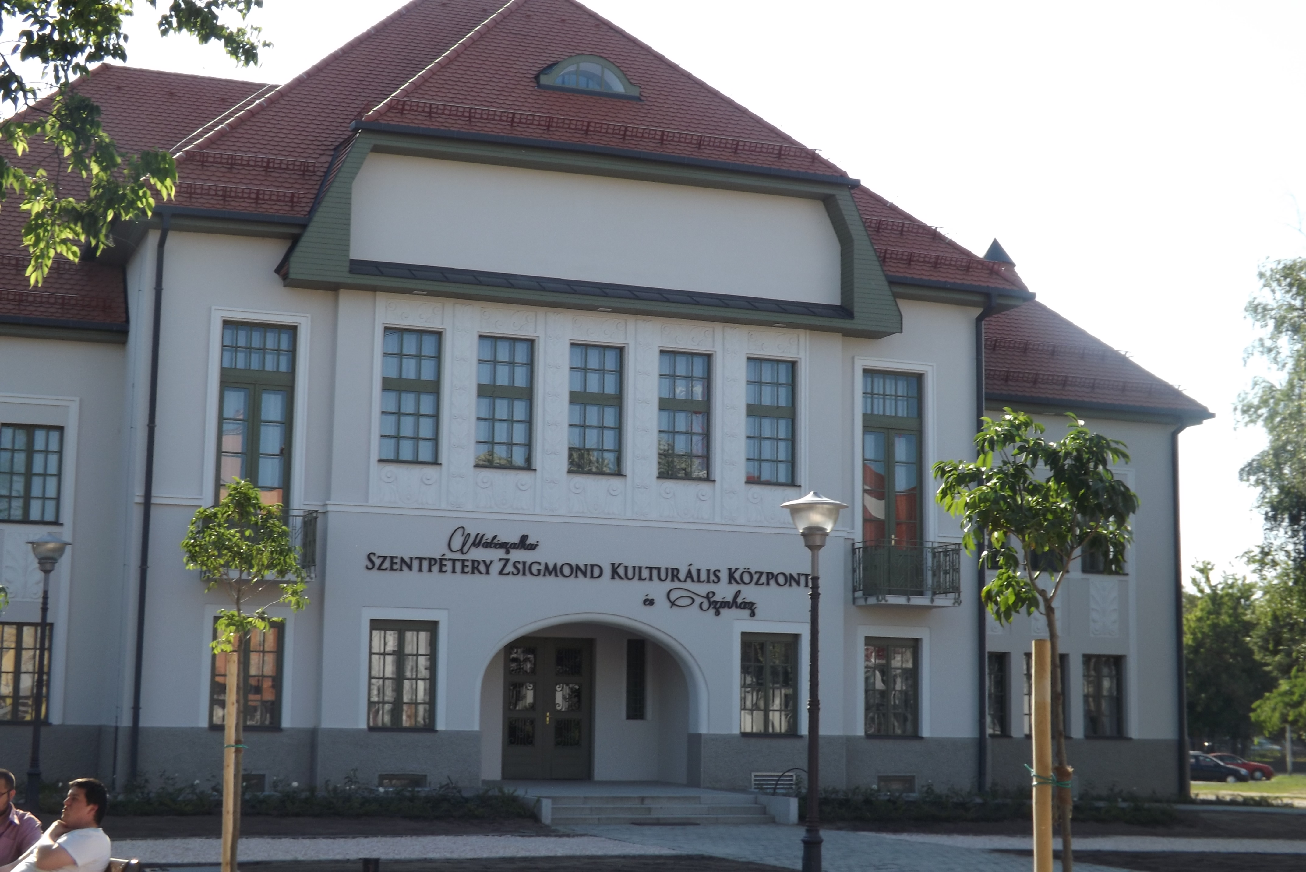 Szentpétery Zsigmond Kulturális Központ és Színház, Mátészalka